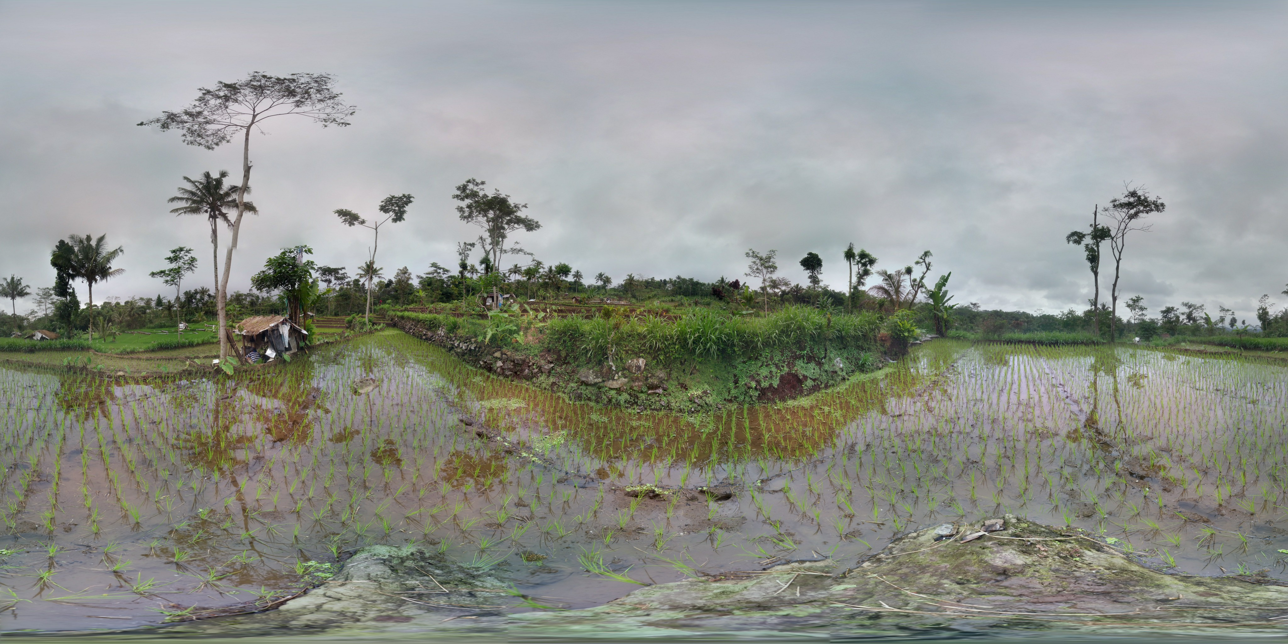 sawah desa limpakuwus dalam foto panorama 360 derajat